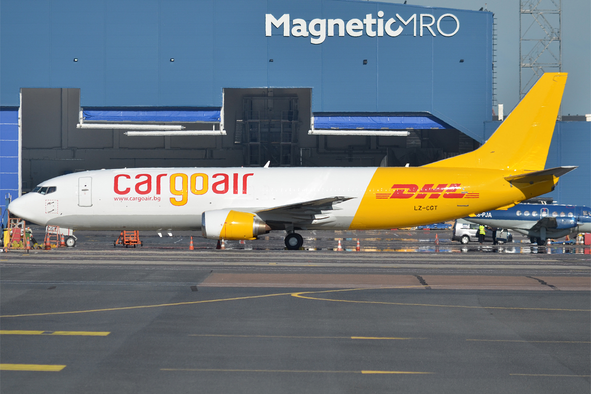 Cargo Air, LZ-CGT, Boeing 737-4Y0 SF